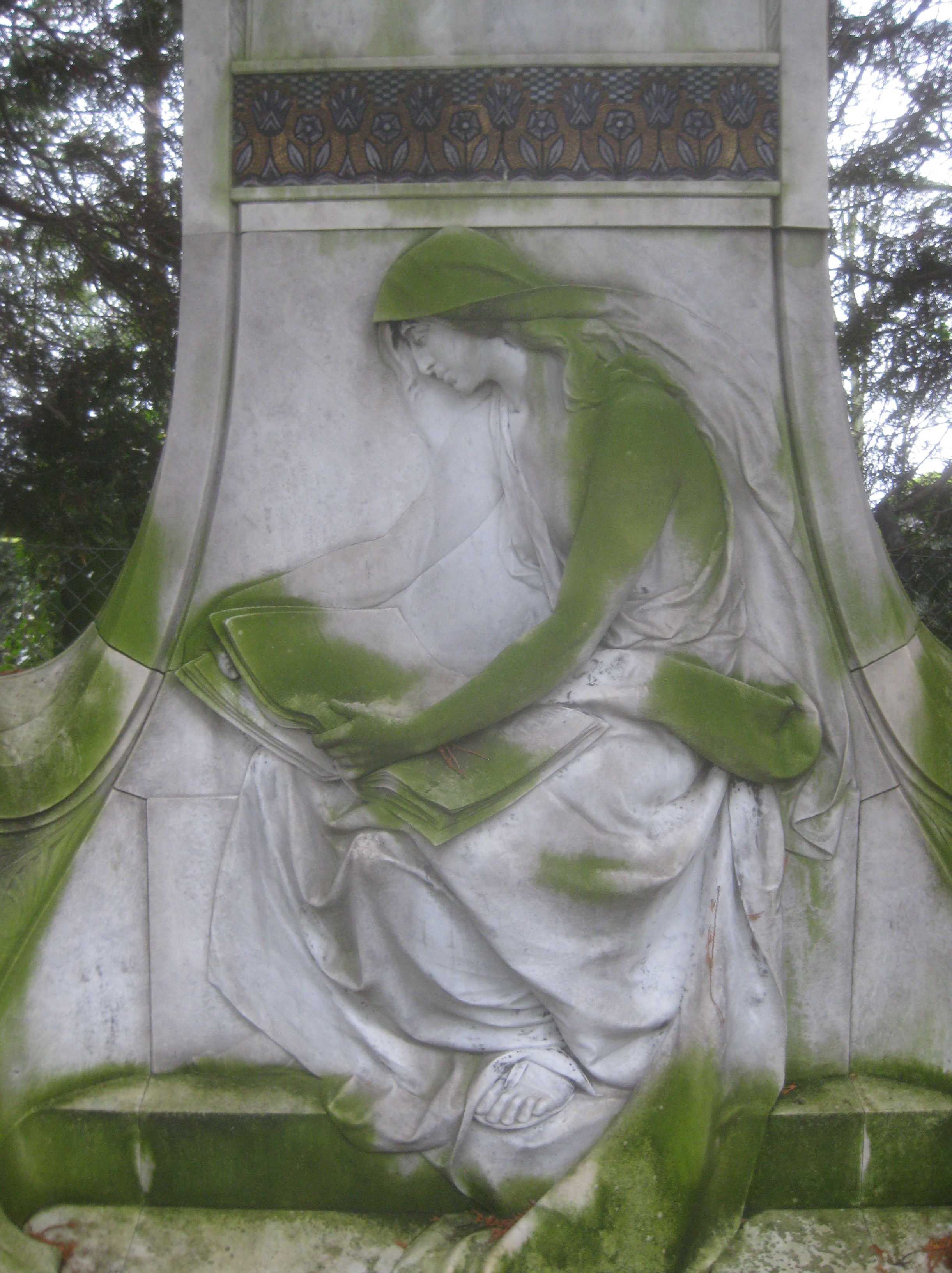 Grabmal Familie Köchele mit Jugendstilrelief einer lesenden Frau von Theodor Bausch, weißer Marmor, Stuttgart, Pragfriedhof, Abteilung 16, an der Mauer zum Israelitischen Friedhof.